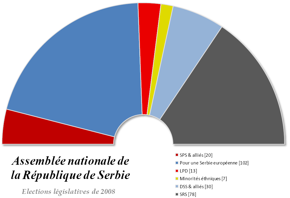 Composition de l'Assemblée Nationale de la République de Serbie à l'issue des élections législatives serbes de 2008.